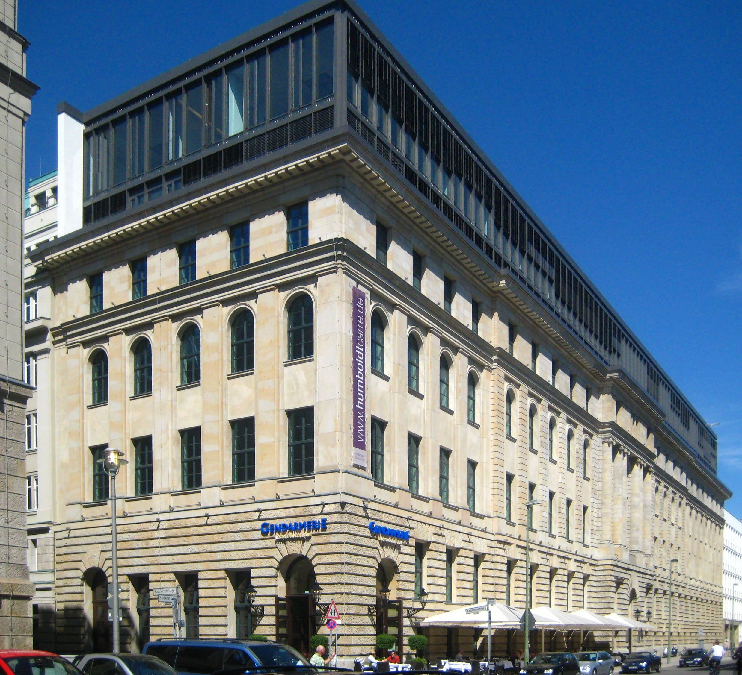 Das "Humboldt-Carré" in der Behrenstraße 42-45, Ecke Charlottenstraße (links), in Berlin-Mitte, ehemals zum Komplex der Disconto-Gesellschaft gehörend ("Bauteil I"). Weitere erhaltene Bauteile des Disconto-Komplexes ("Bauteile II & III") befinden sich an Charlottenstraße und Unter den Linden. Der Kern des Gebäudes wurde 1900-1901 nach einem Entwurf von Ludwig Heim errichtet. Die Architekten Bielenberg & Moser führten 1909-1912 eine Erweiterung und 1921-1925 eine Aufstockung durch. Mit Fusion der Banken kam der gesamte Komplex in den Besitz der Deutschen Bank. 1934 wurde der Bauteil I vom Deutschen Reich übernommen und war danach Hauptsitz des Reichswirtschaftsministeriums. In der DDR-Zeit wurde das Gebäude unter anderem vom Ministerium für Bauwesen genutzt. Nach 1990 residierten hier Abteilungen der Senatsverwaltung für Stadtentwicklung. 2005 übernahm die BonnVisio GmbH & Co. KG das Gebäude und baute es 2007-2008 nach Plänen des Architekten Karl-Heinz Schommer zum Bürohaus "Humboldt-Carree" um. Dabei wurde es um zwei gläserne Staffelgeschosse aufgestockt. Als Teil des Bauensembles Unter den Linden ist das Gebäude denkmalgeschützt.